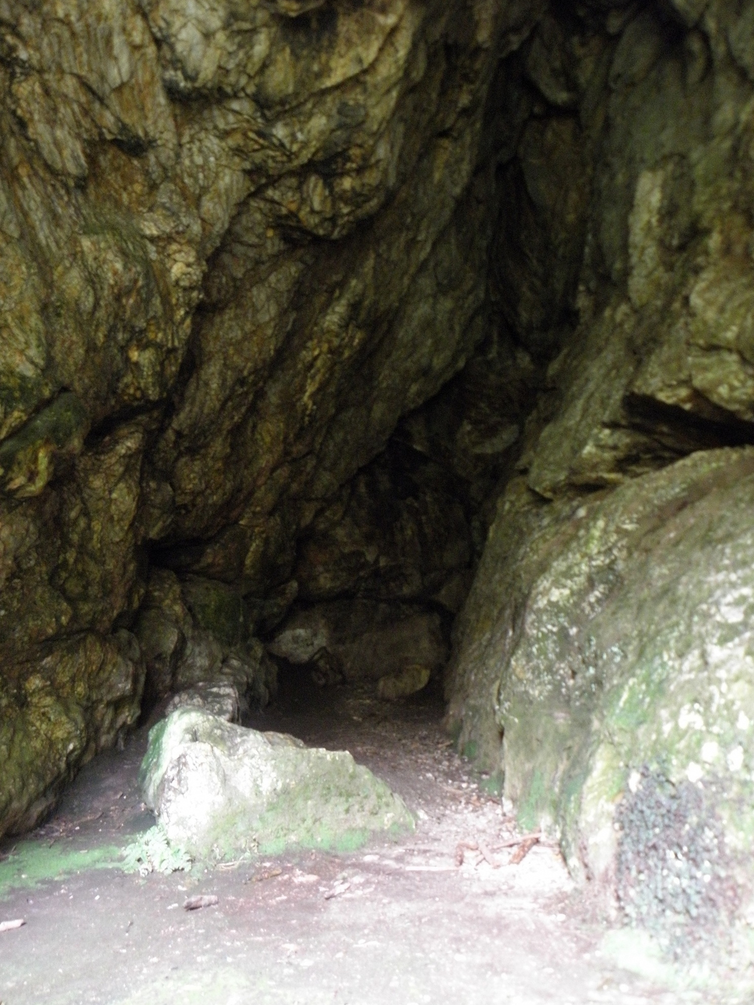 Grotte et rocher de Roc'h-Toul en Guiclan (29). .